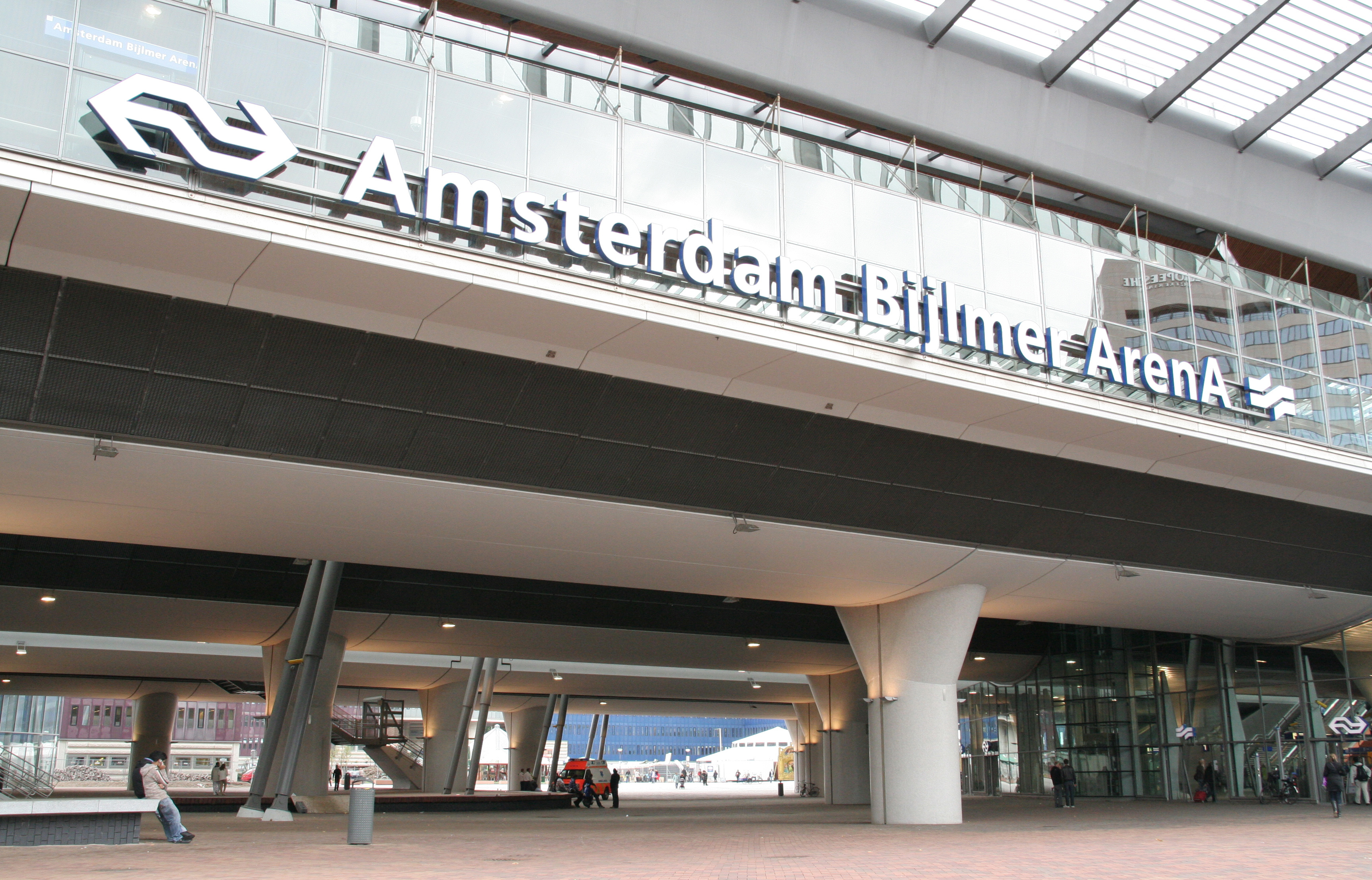 Toegang station Amsterdam Bijlmer ArenA aan Arenazijde.